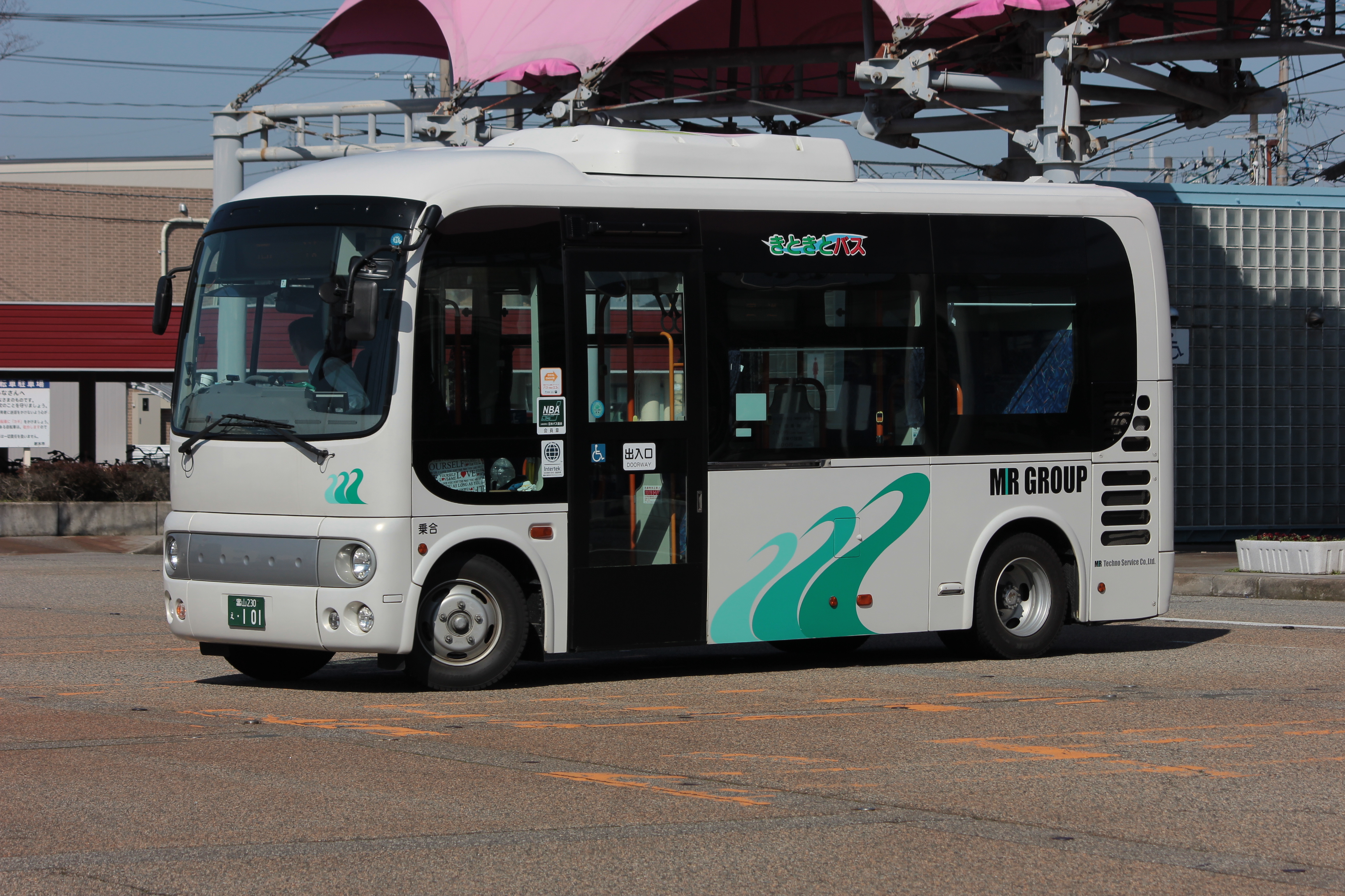 富山県射水市のコミュニティバス「きときとバス」。エムアールテクノサービスの車両。 Canon EOS Kiss X5